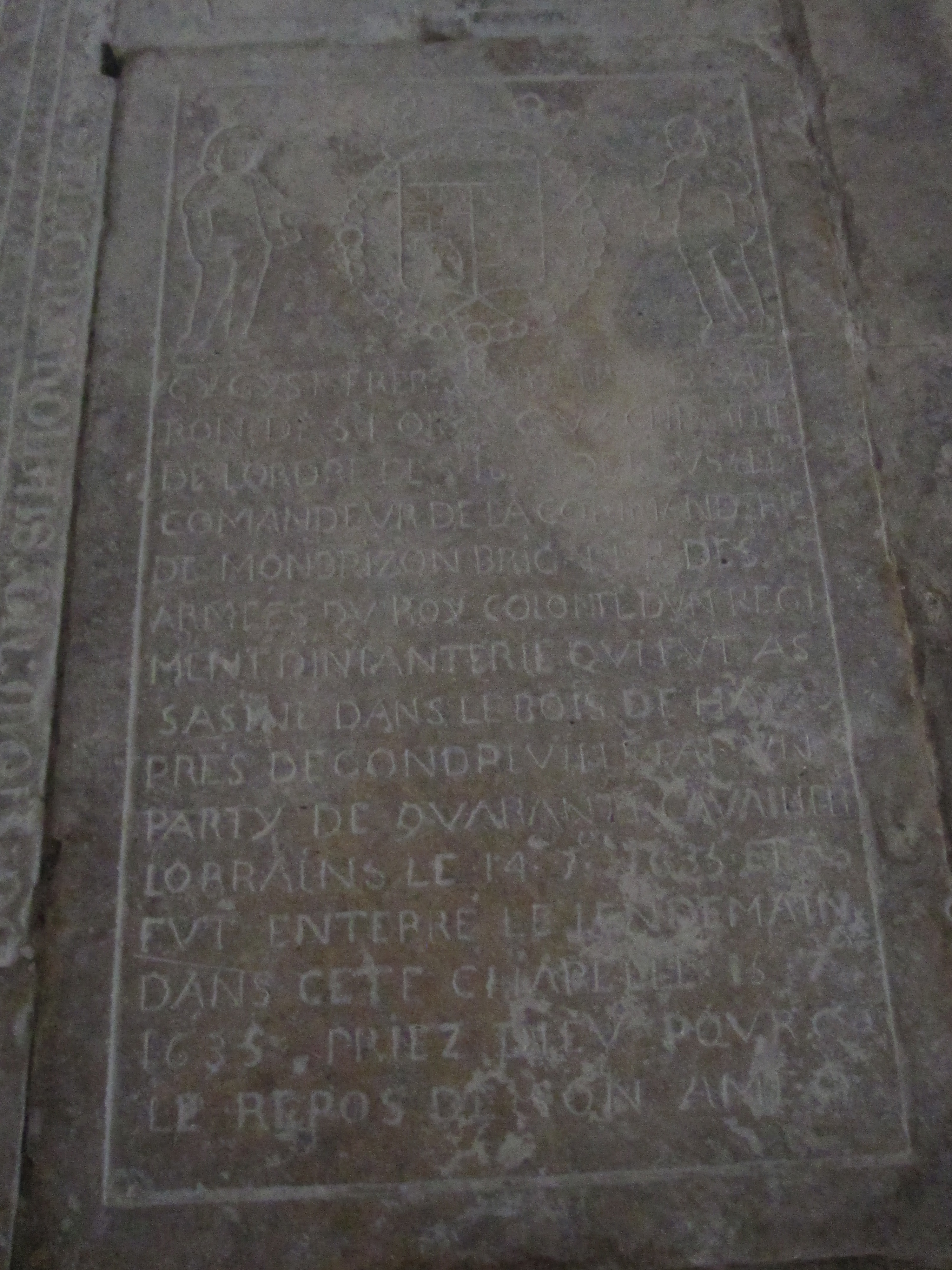 Toul (Meurthe-et-Moselle, France), cathédrale St Étienne, dalle funéraire de Bertrand d'Albon (Saint-Forgeux 1590 - bois de Haye près de Gondreville 1635), chevalier de l'ordre de St Jean de Jérusalem, commandeur de la commanderie de Montbrison, brigadier des armées du roi, colonel d'un régiment d'infanterie, assassiné par un parti de quarante cavaliers lorrains.